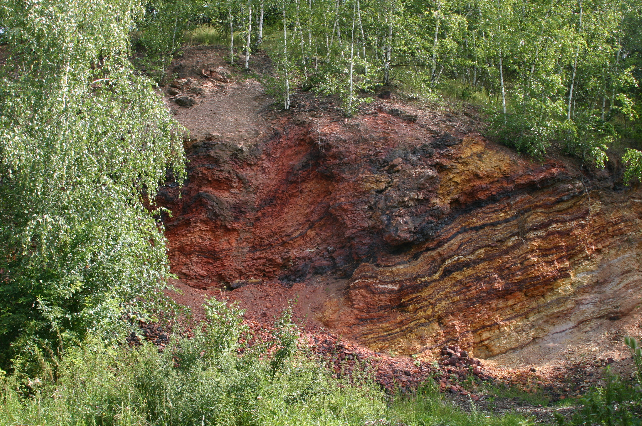 Bývalý lom na porcelanit mezi obcemi Korozluky a Dobrčice v okrese Most